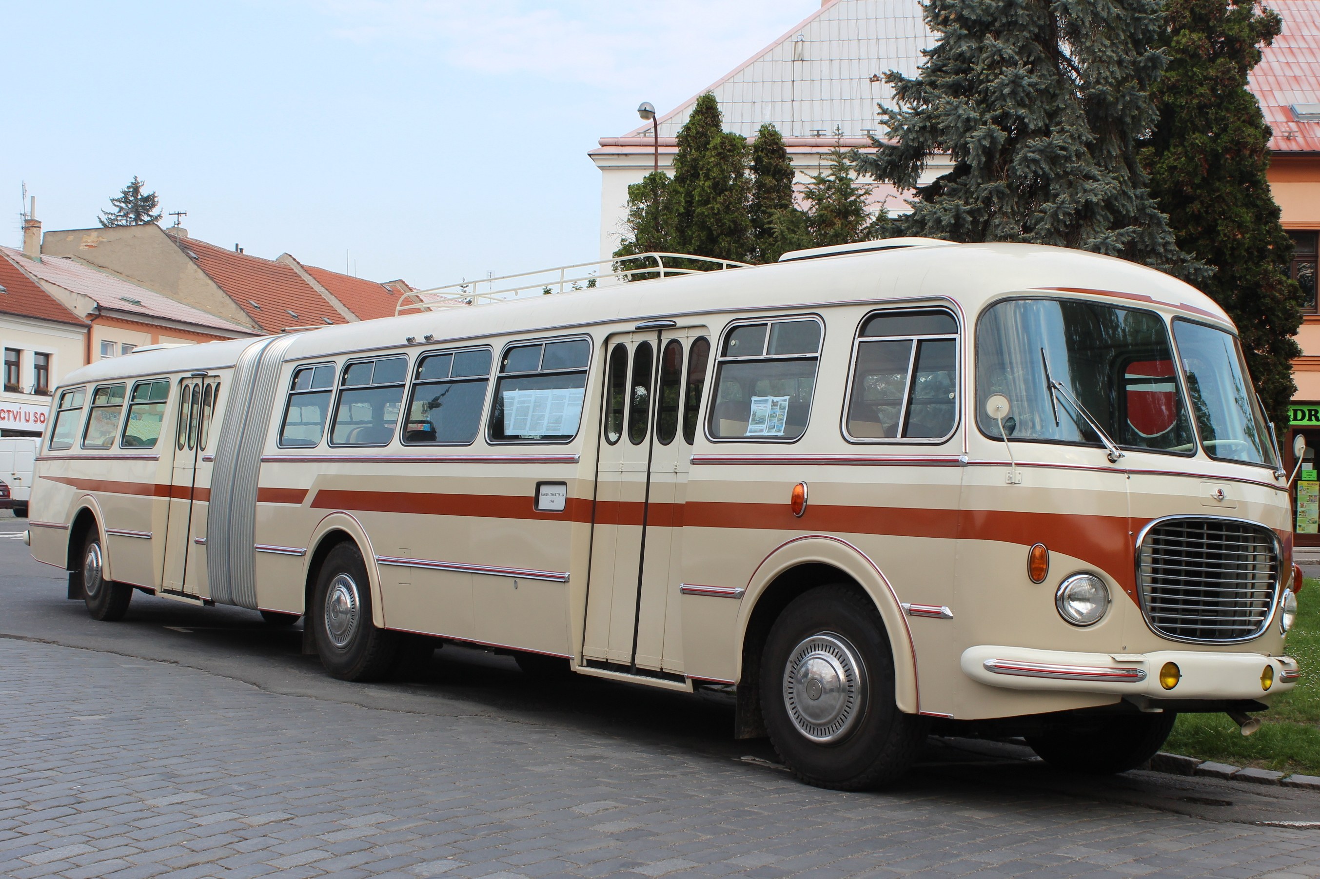 Replika autobusu Š 706 RTO-K při předvádění v Českém Brodě